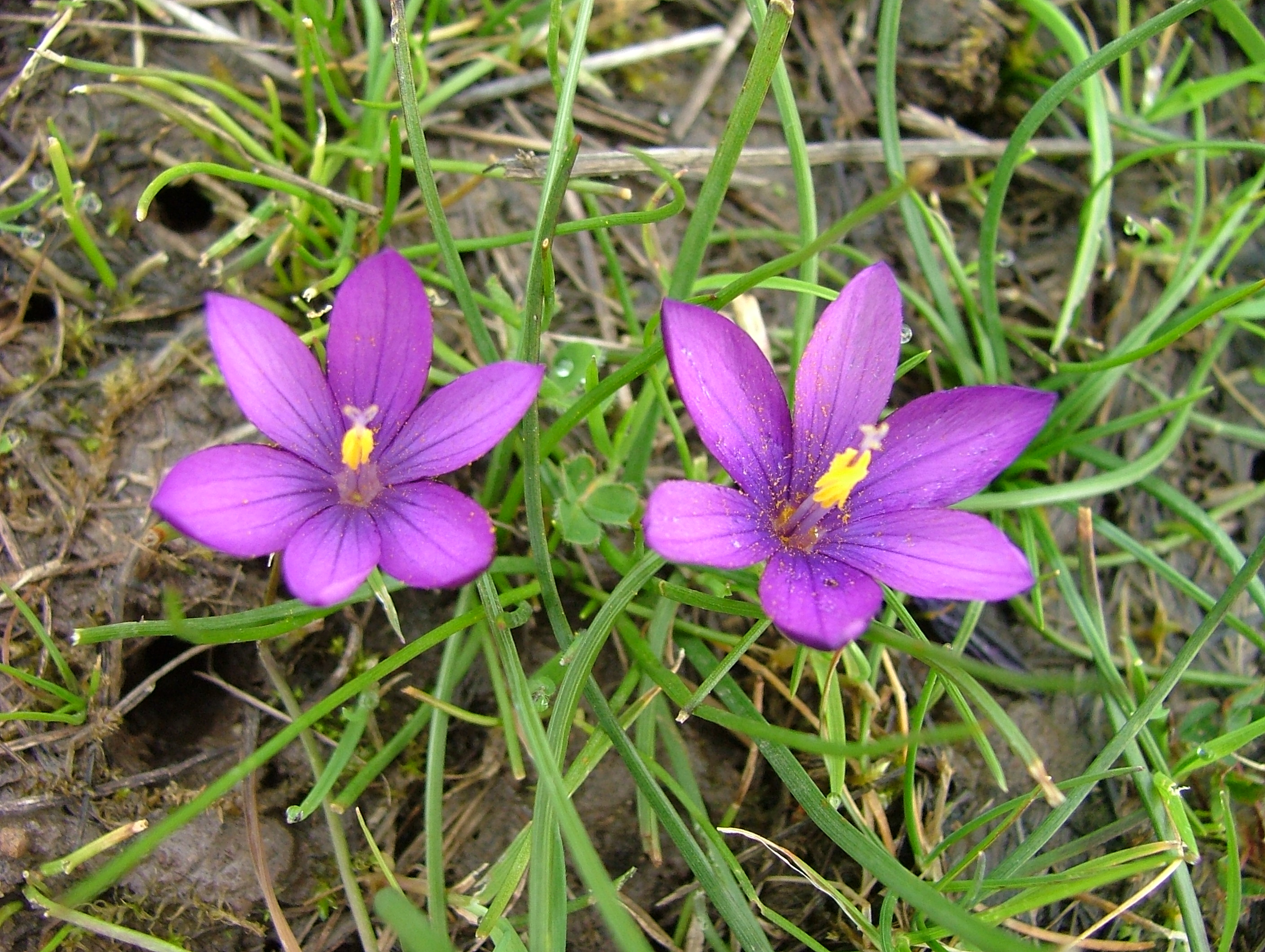 Fiori di Romulea requienii.